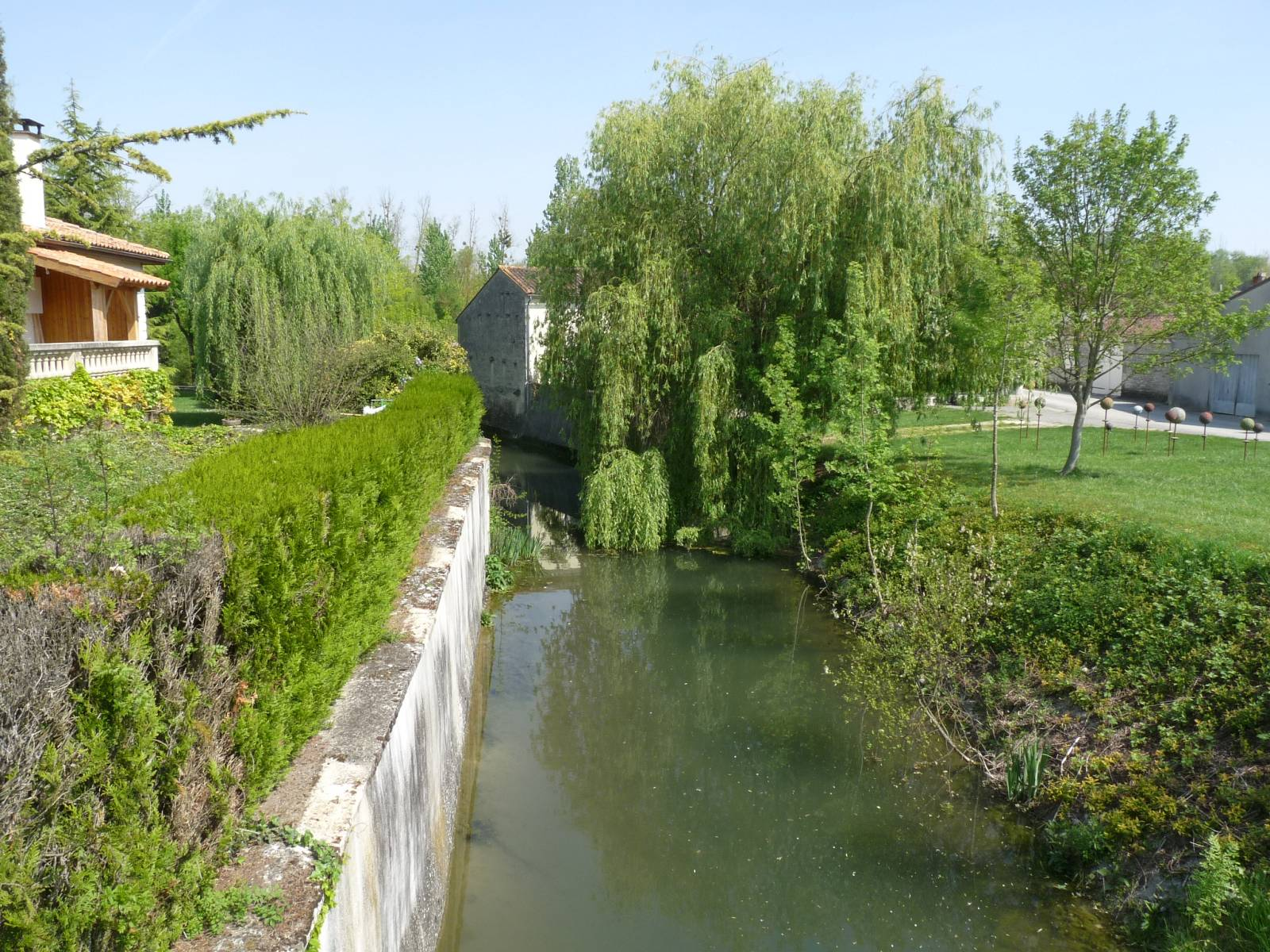 La Soloire à Bréville, Charente, France